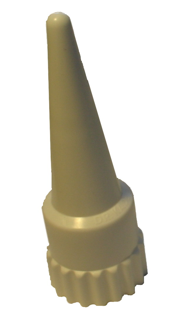 Medizinischer Analdehner der Marke "Dr. Kade Posterisan", welcher auf Rezept in der Apotheke erhältlich ist.